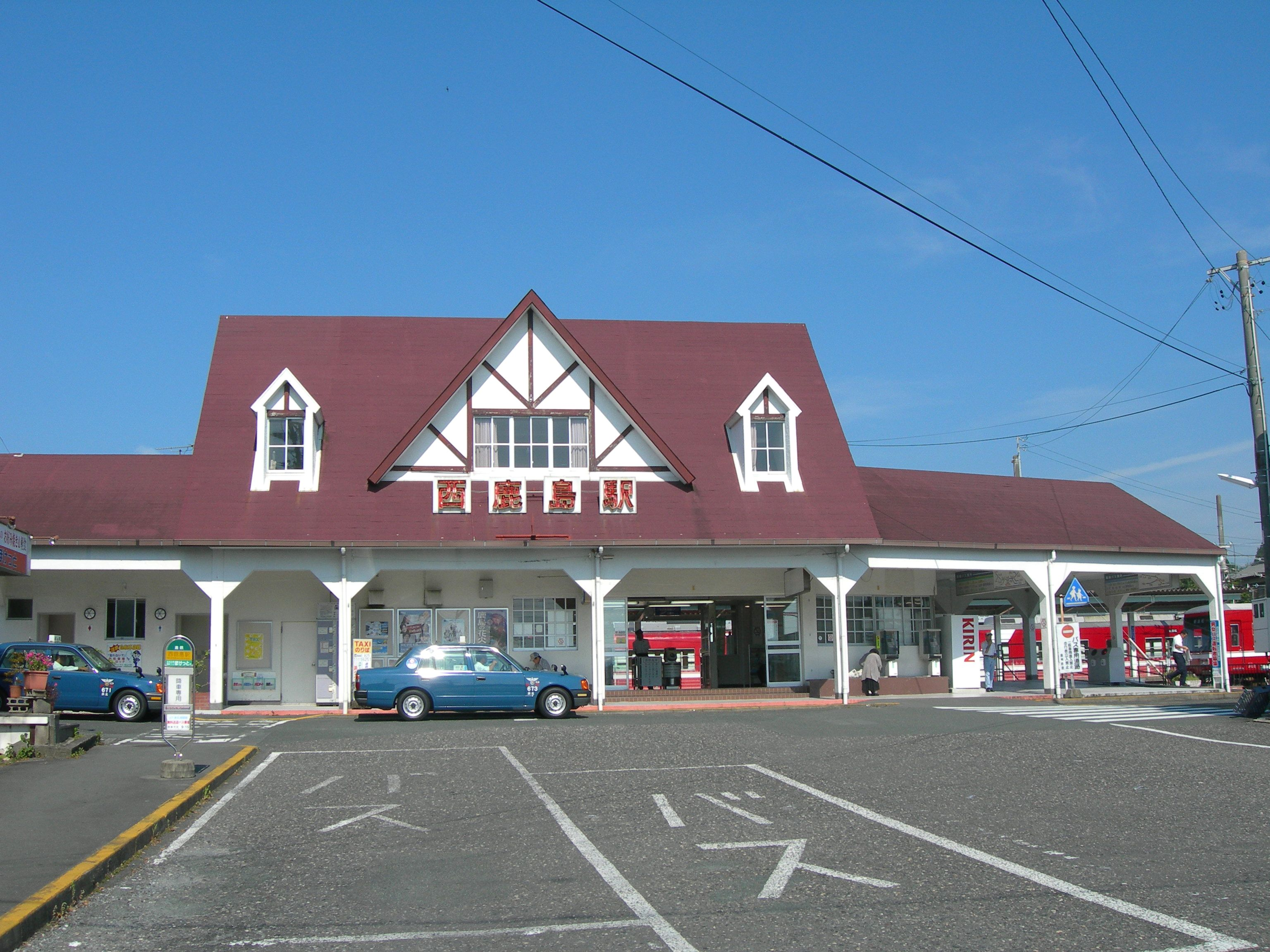 西鹿島駅